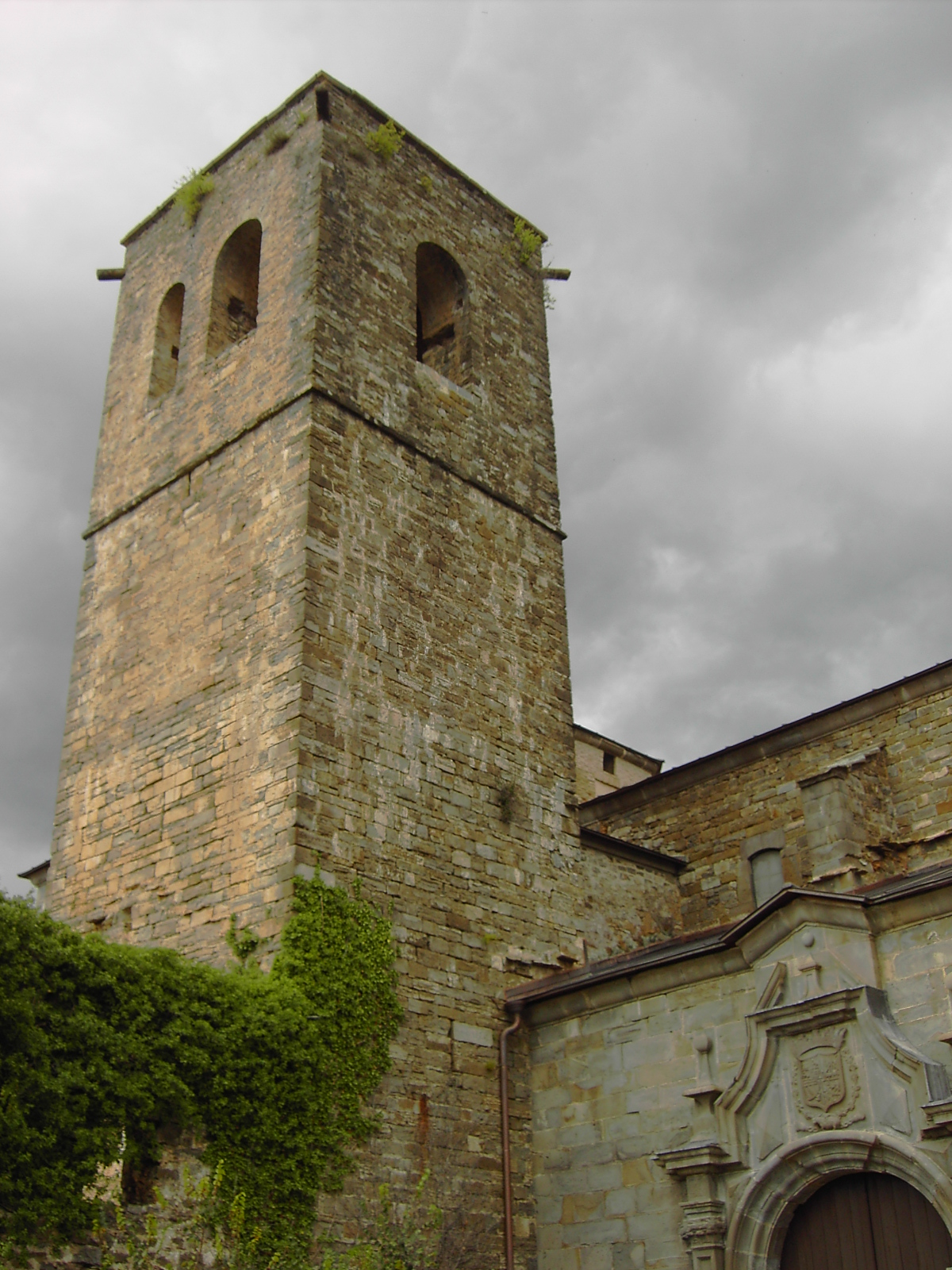 Campanario del monasterio de San Victorián.